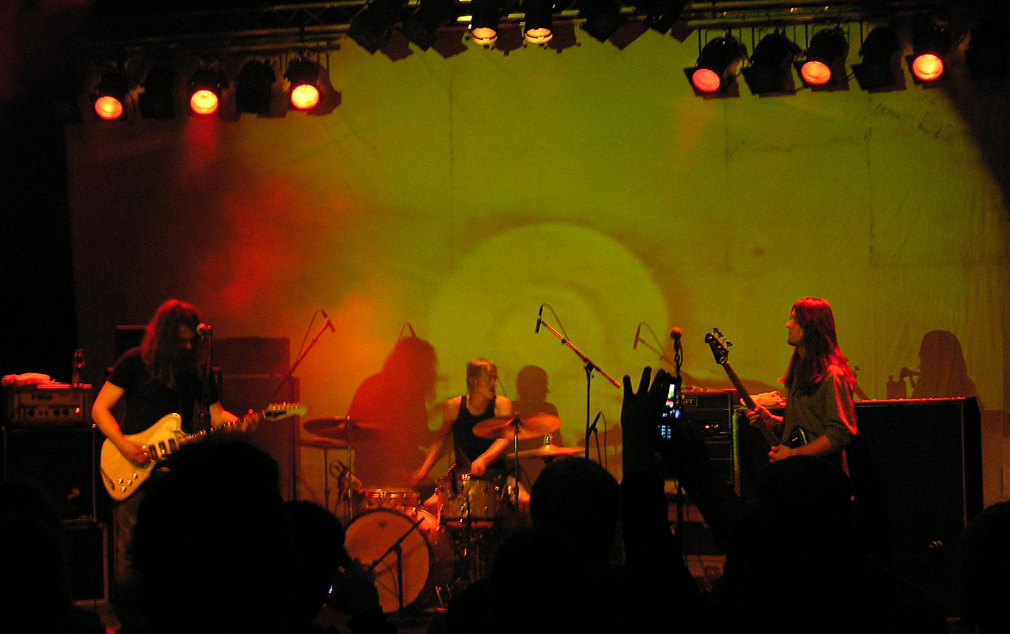 Motorpsycho playing live at Studenten, Steinkjer, 2008-04-18